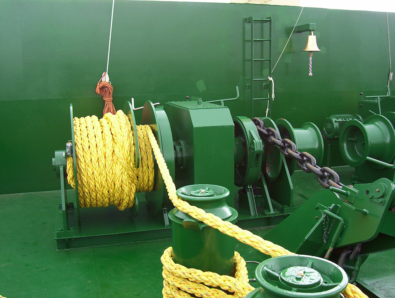 Moderne Ankerwinde mit Festmacherteil und Spillkopf an Bord der MV Bornholm im Hafen von Delfzijl, Juni 2006